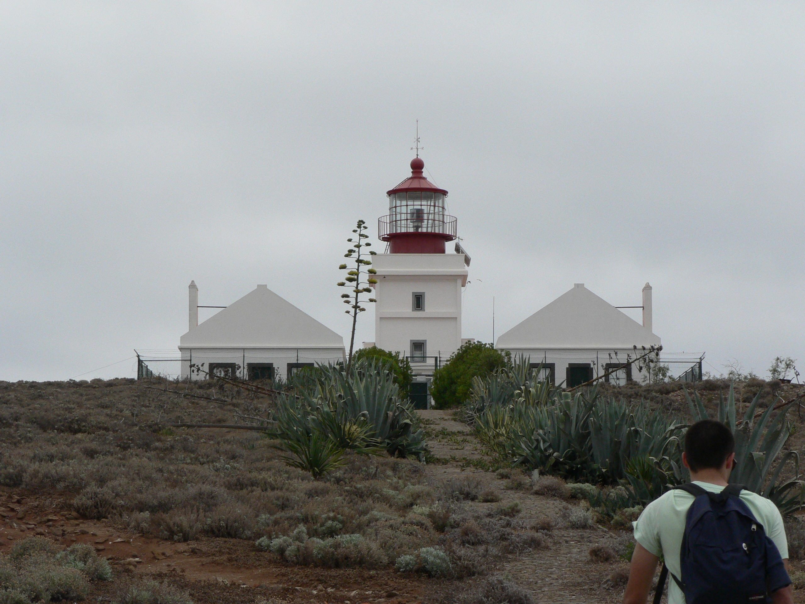 Farol do Ilhéu de Cima; localizado no Ilhéu de Cima, ilha de Porto Santo, arquipélago da Madeira, Portugal.